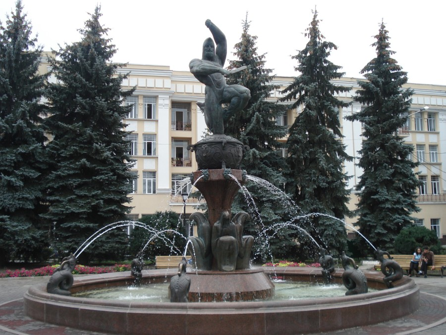 Памятник нарту Сослану во Владикавказе.